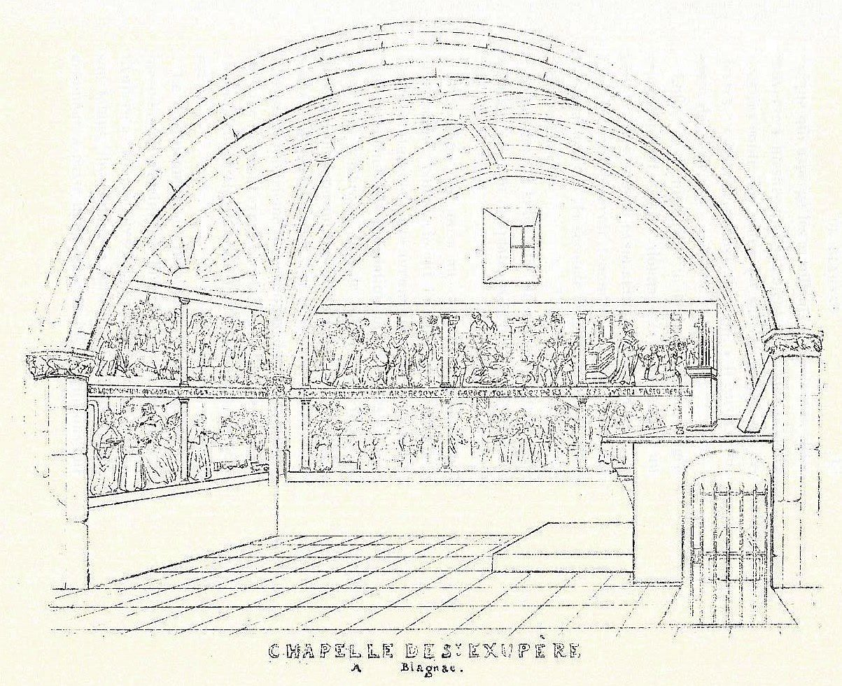 Blagnac, chapelle de Saint-Exupère au prieuré en 1875.